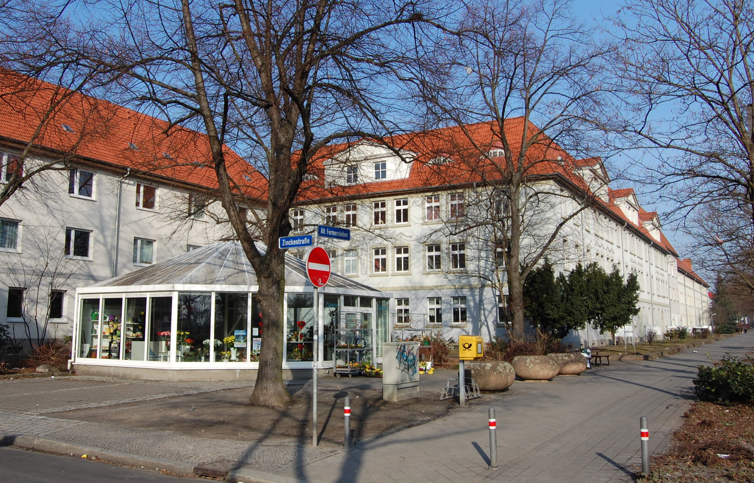 Zinckestraße Ecke Alt Fermersleben